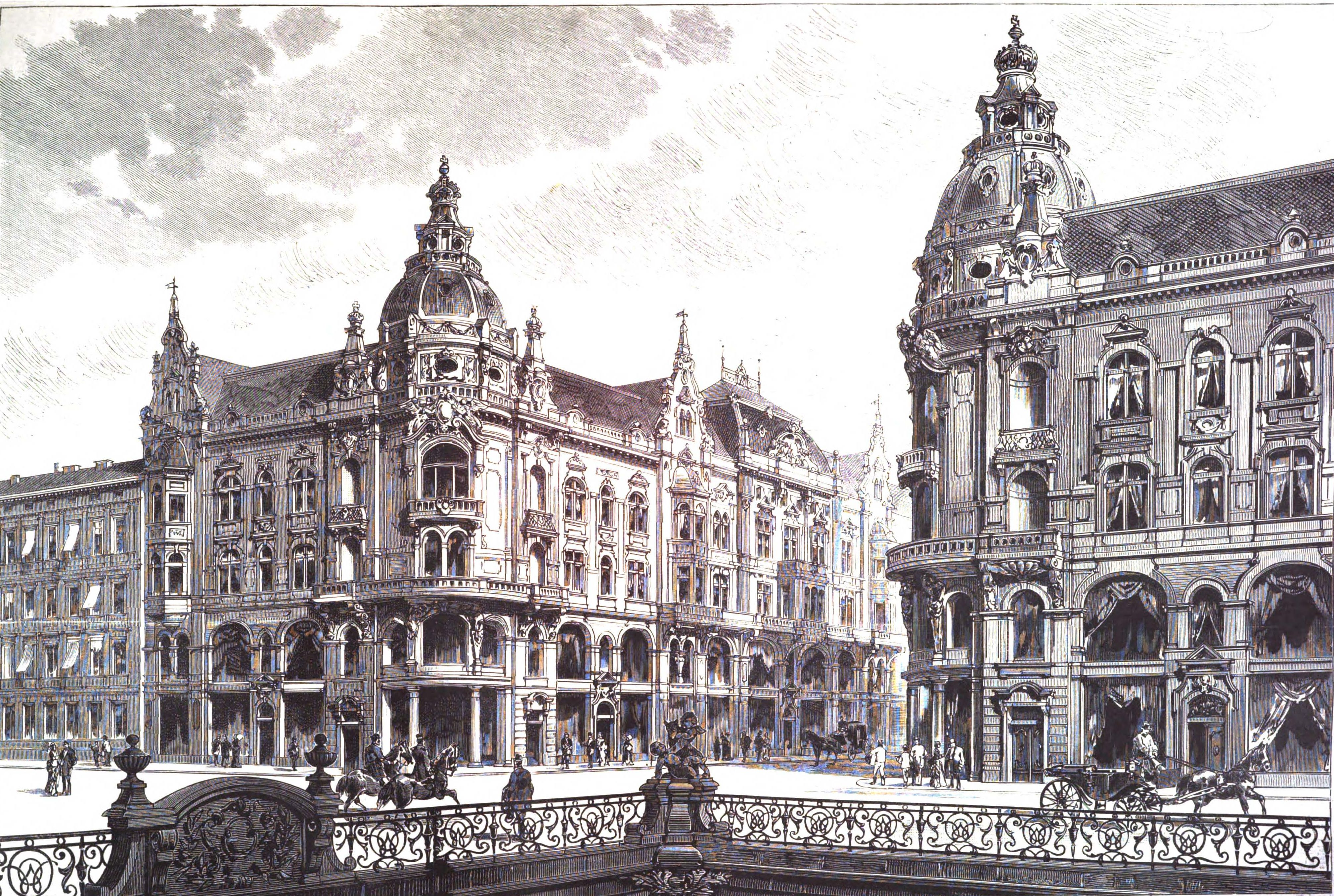 Preisgekrönter Entwurf der Kaiser-Wilhelm-Straße in Berlin von 1885 Architekten Cremer und Wolffenstein Illustrirte Zeitung 1885, Bd. 84, S. 254 (Bild) und 255 (Text)